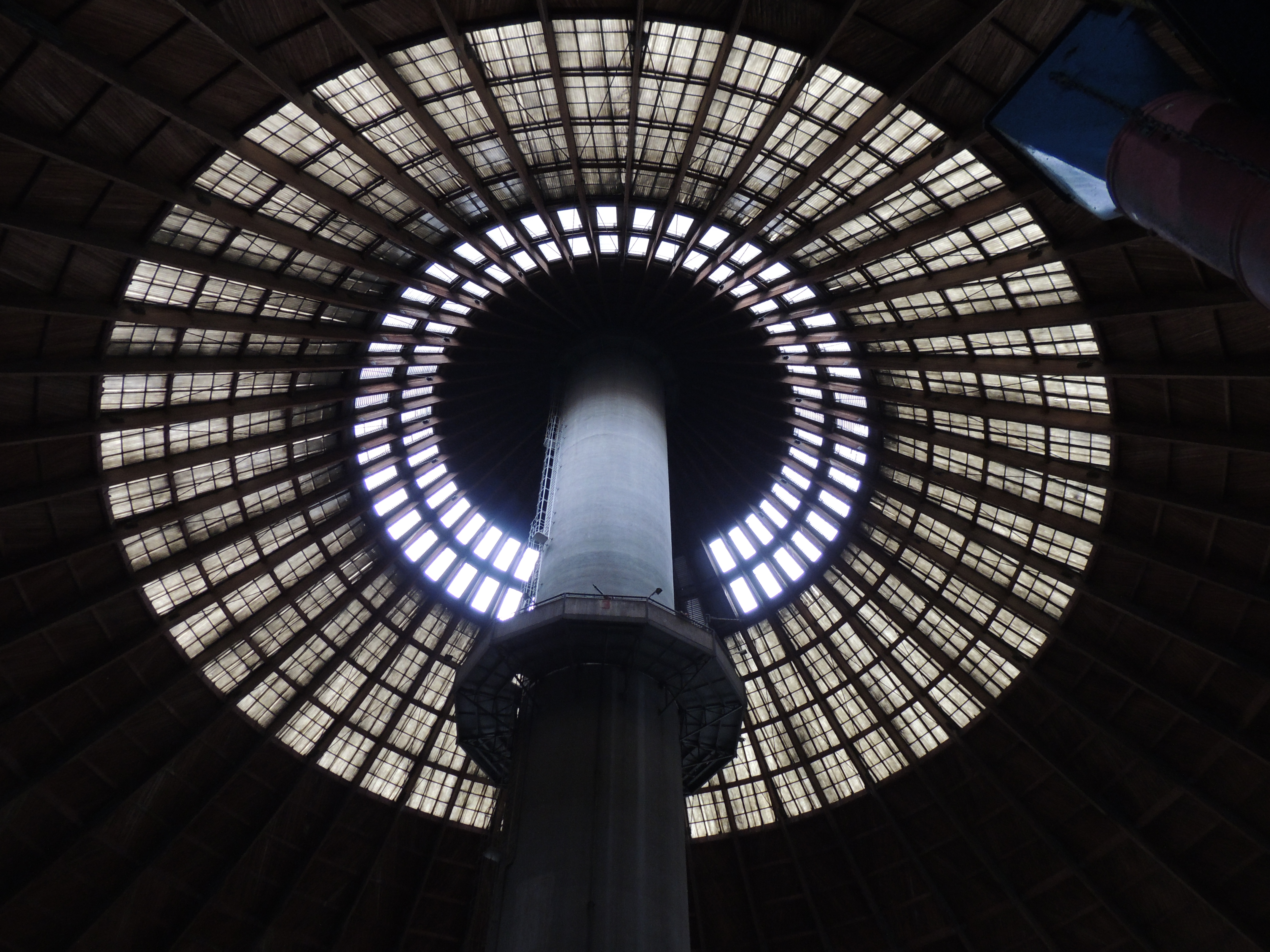 Detail im Zentrum der Dachkonstruktion